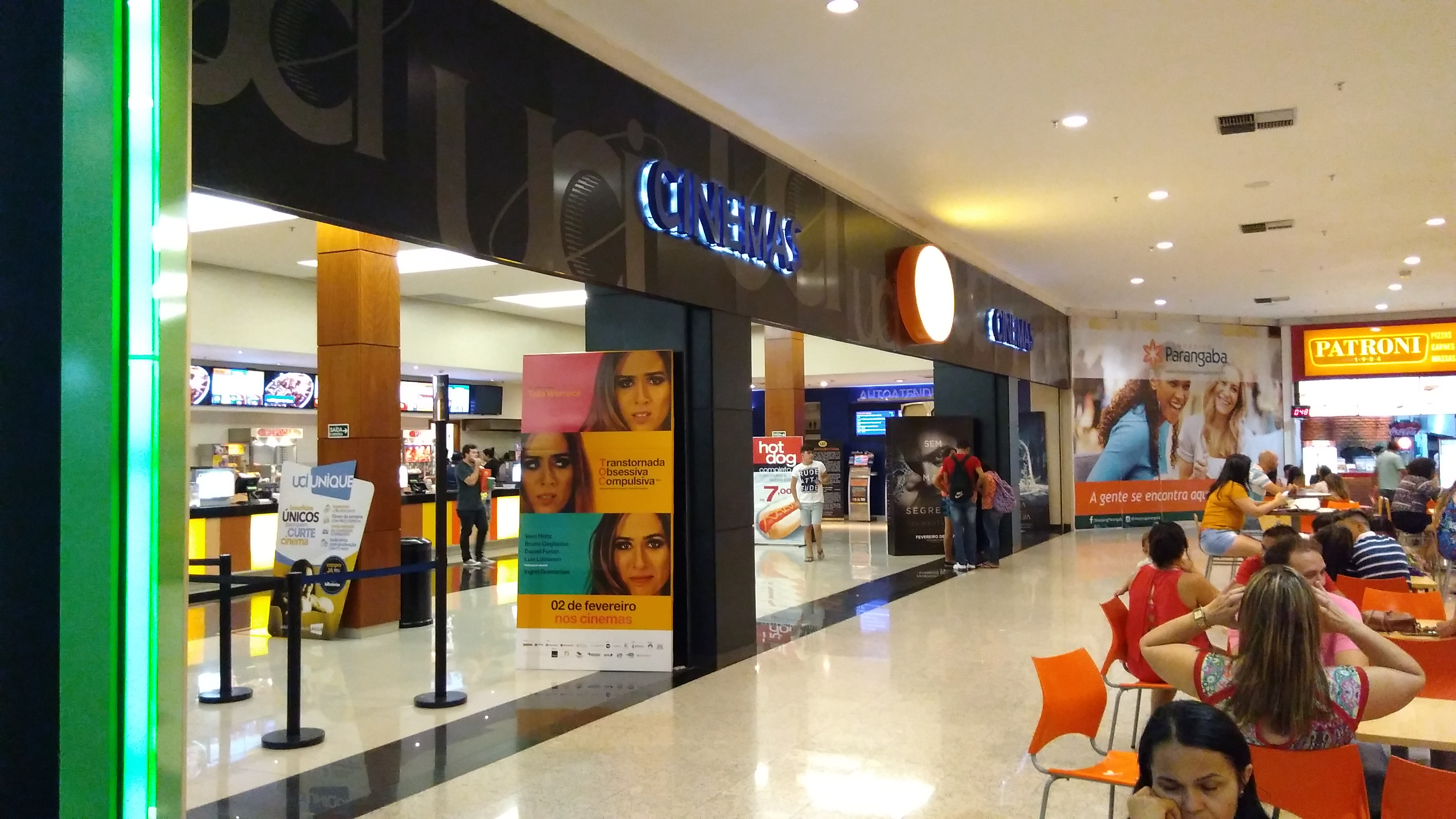 Área externa do UCI Shopping Parangaba de Fortaleza, CDE